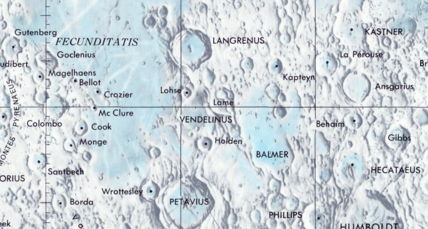 Cráter lunar Vendelinus. Localización. (Lunar Chart LPC1. Second Edition)